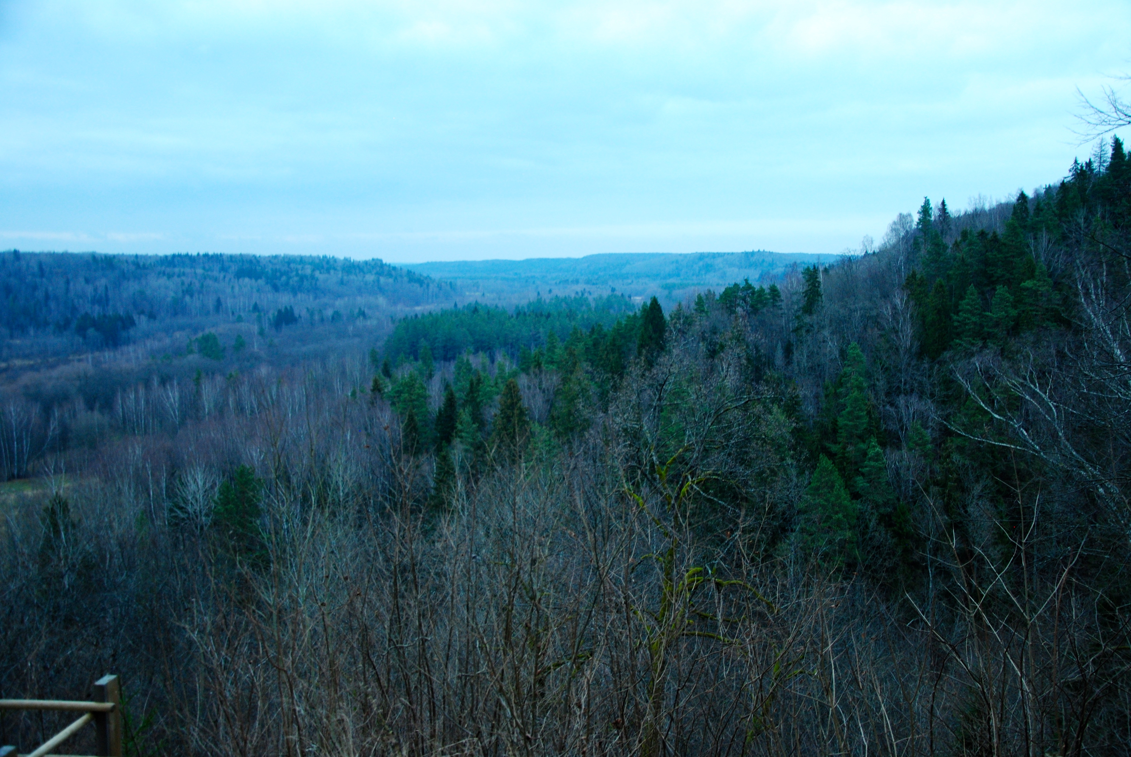 Gaujas nacionālais parks